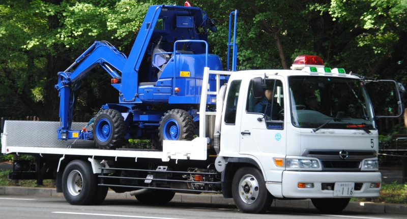 警視庁の爆発物処理用具運搬車。